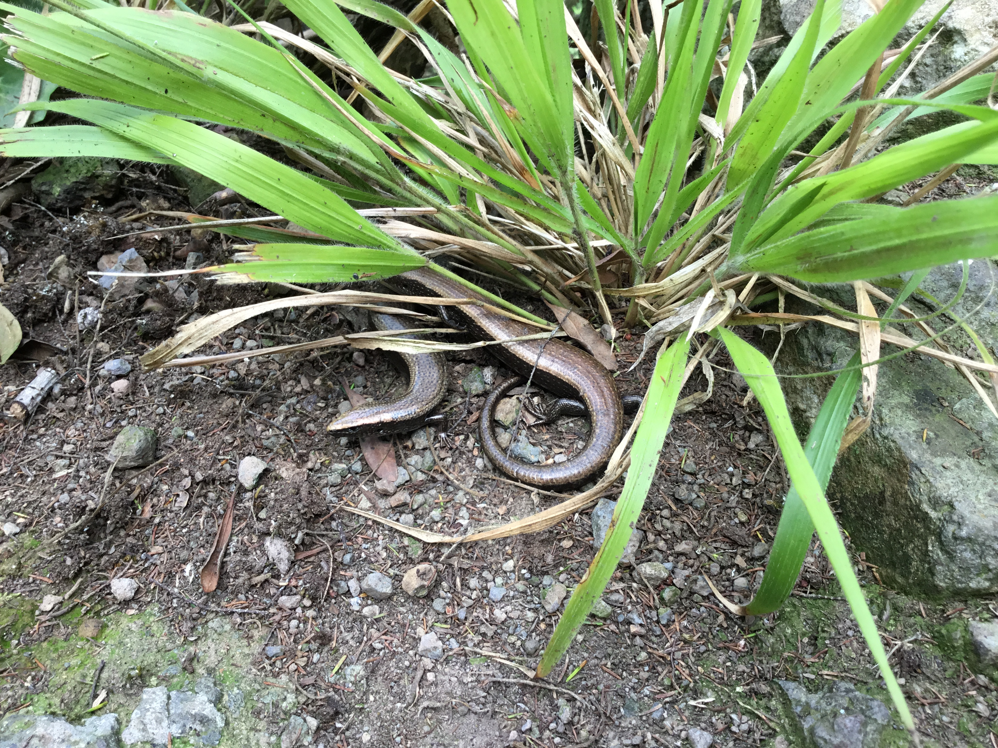 Dos lisas doradas en el parque rural de Anaga